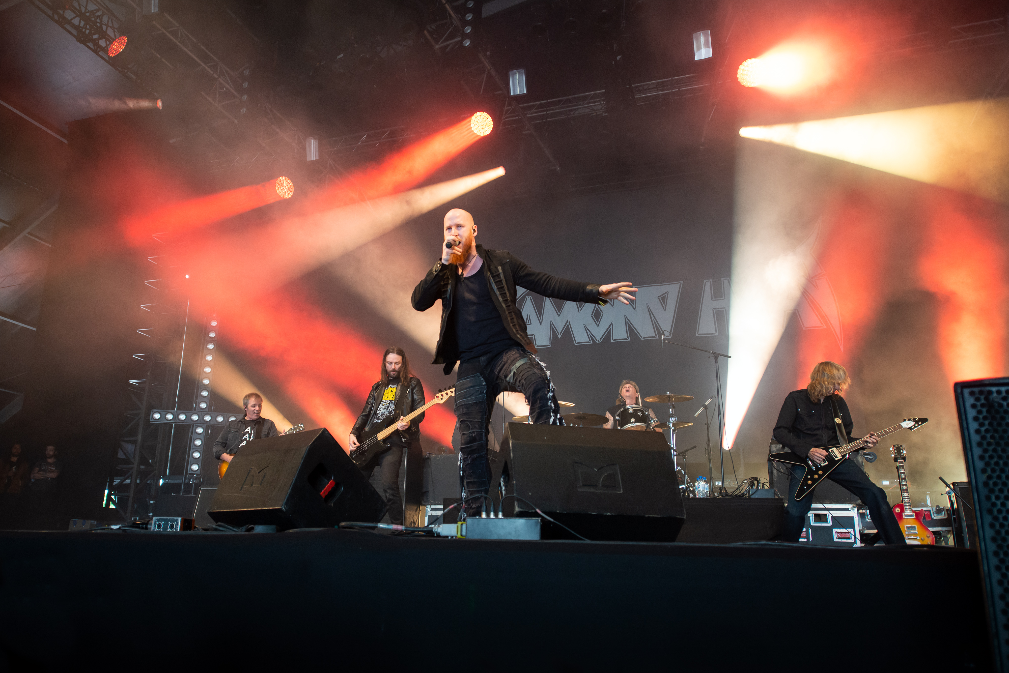 Diamond Head set at 2019 Hellfest, Clisson, France.